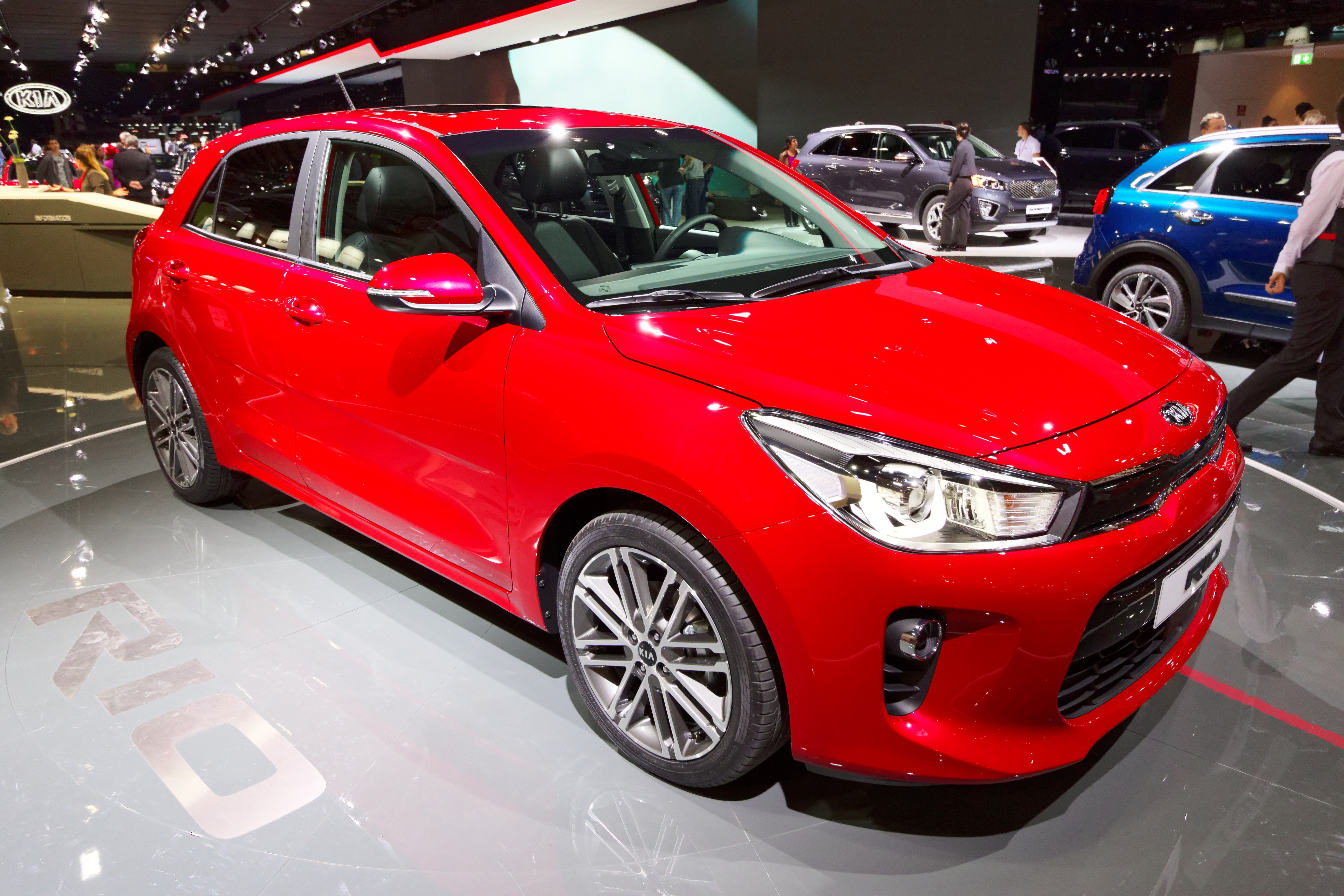 Une Kia Rio présentée lors du mondial de l'automobile de Paris 2016.